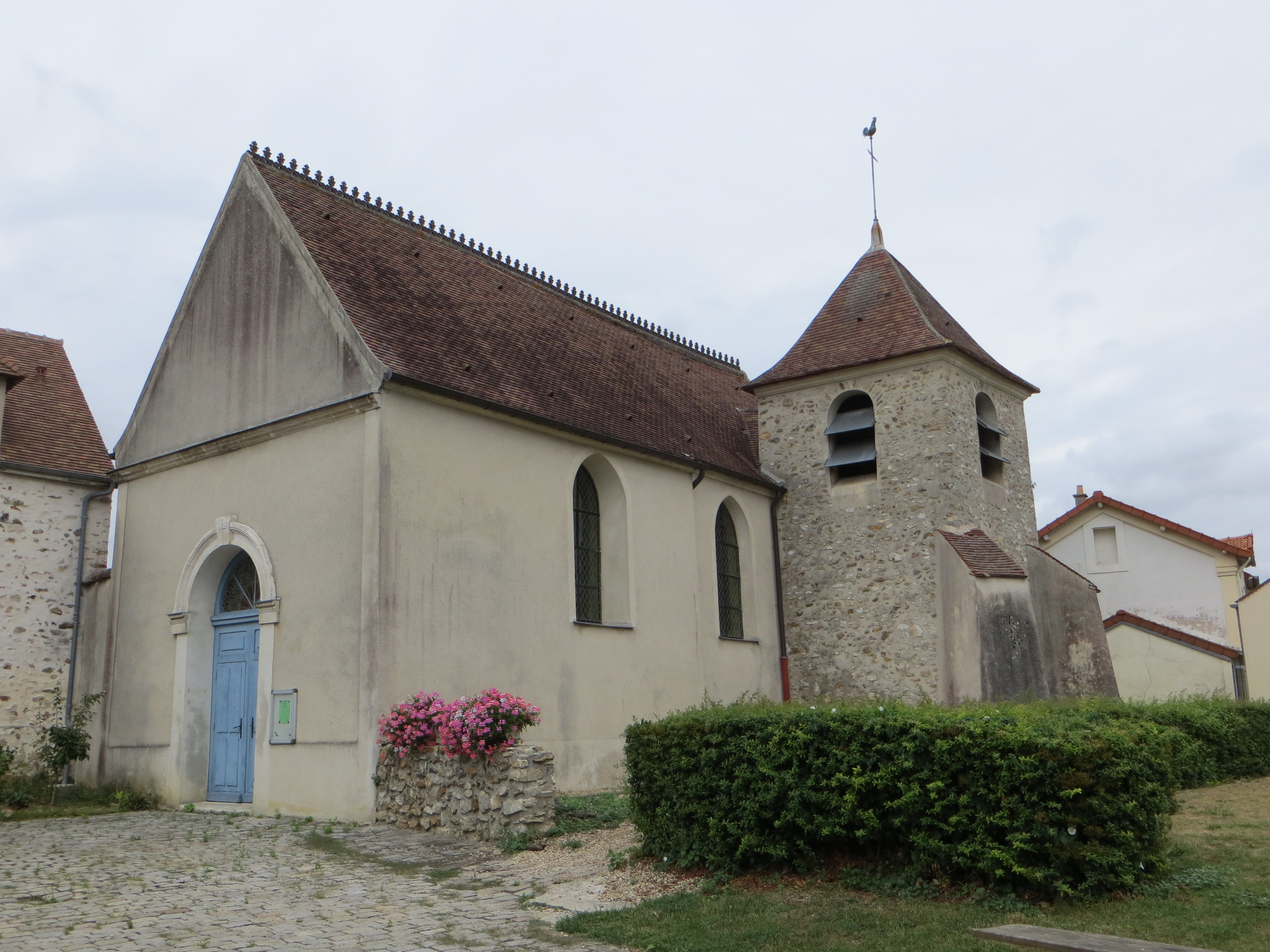 Vue de l'église Saint-Eutrope